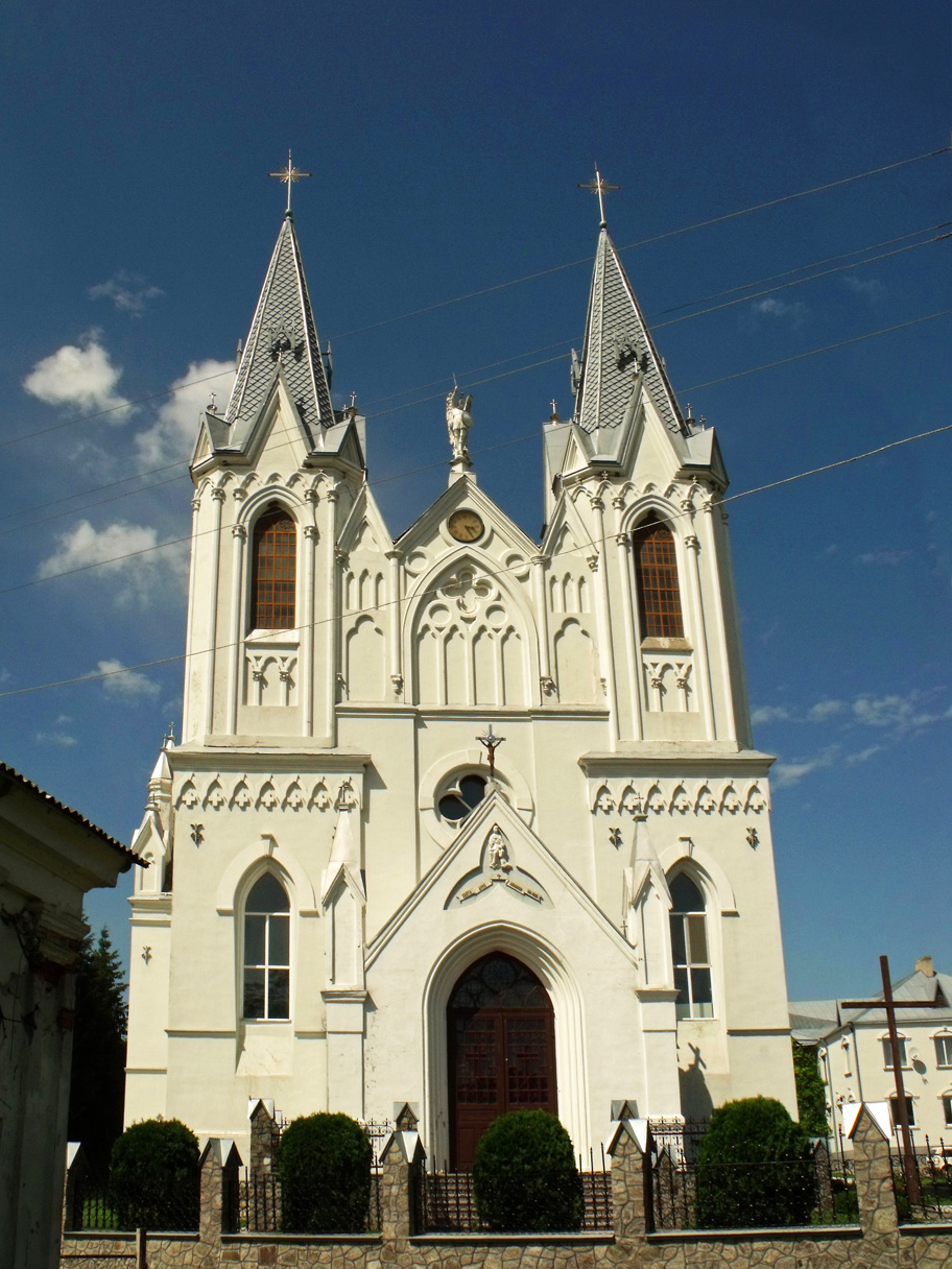 Костьол Св. Миколая, Бар, вул.Св.Миколая,12